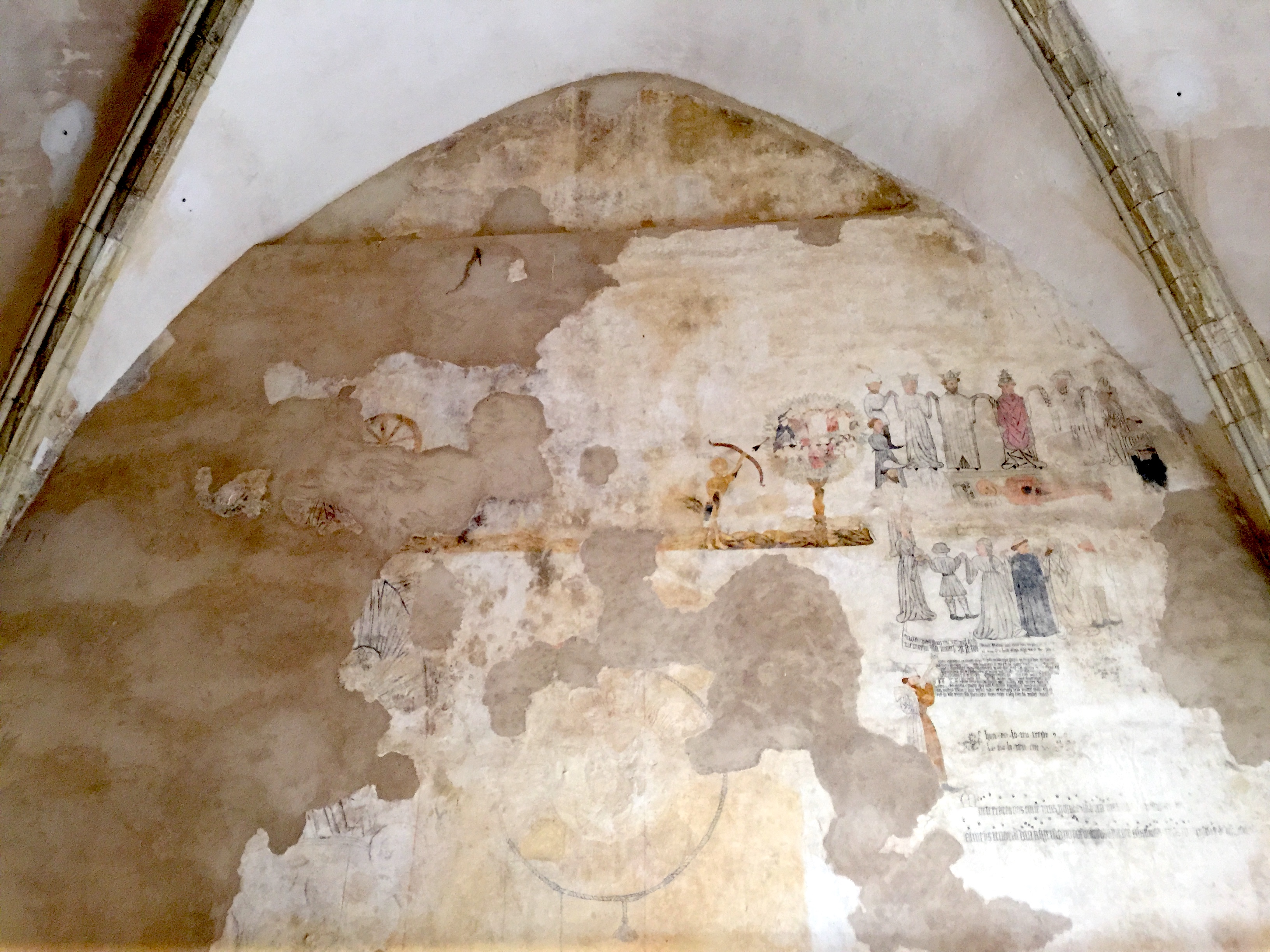 Vue d'ensemble de la fresque peinte dans la salle capitulaire. Template:S